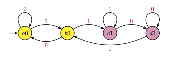 Automate de la suite de pliages, commençant à l'indice 1